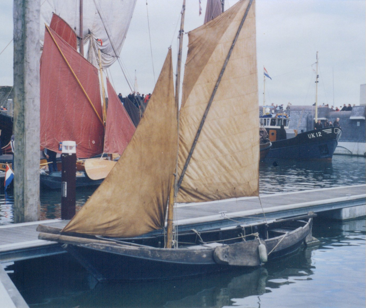 eigen foto